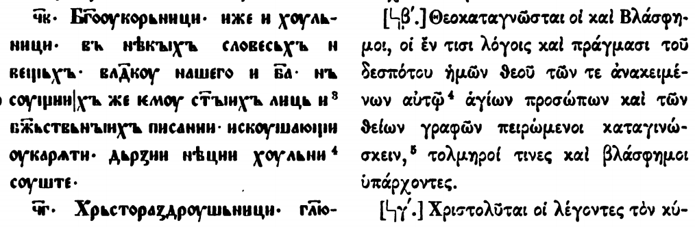 Богоѹкорьници в книге Бенешевича В. Н. Древнеславянская кормчая XIV титулов без толкования. СПб, 1907.Т. 1.